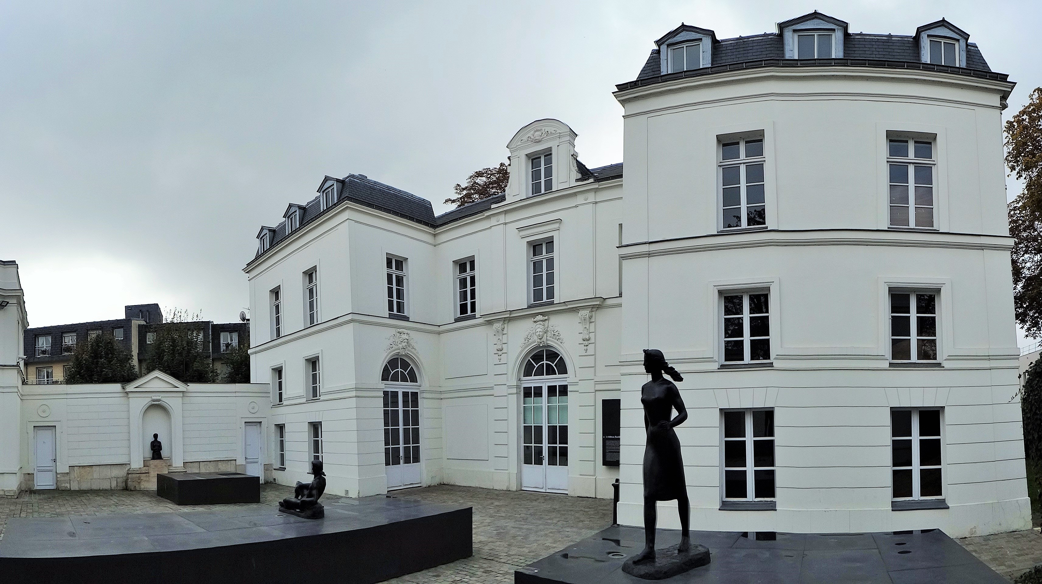 Façade du château Buchillot côté cour, musée Paul Belmondo